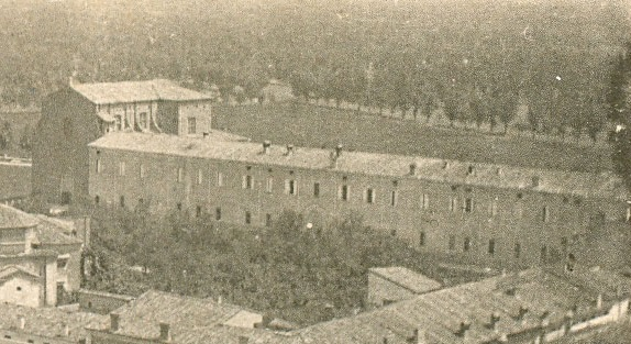 Chiesa del Gesù e collegiata (particolare)